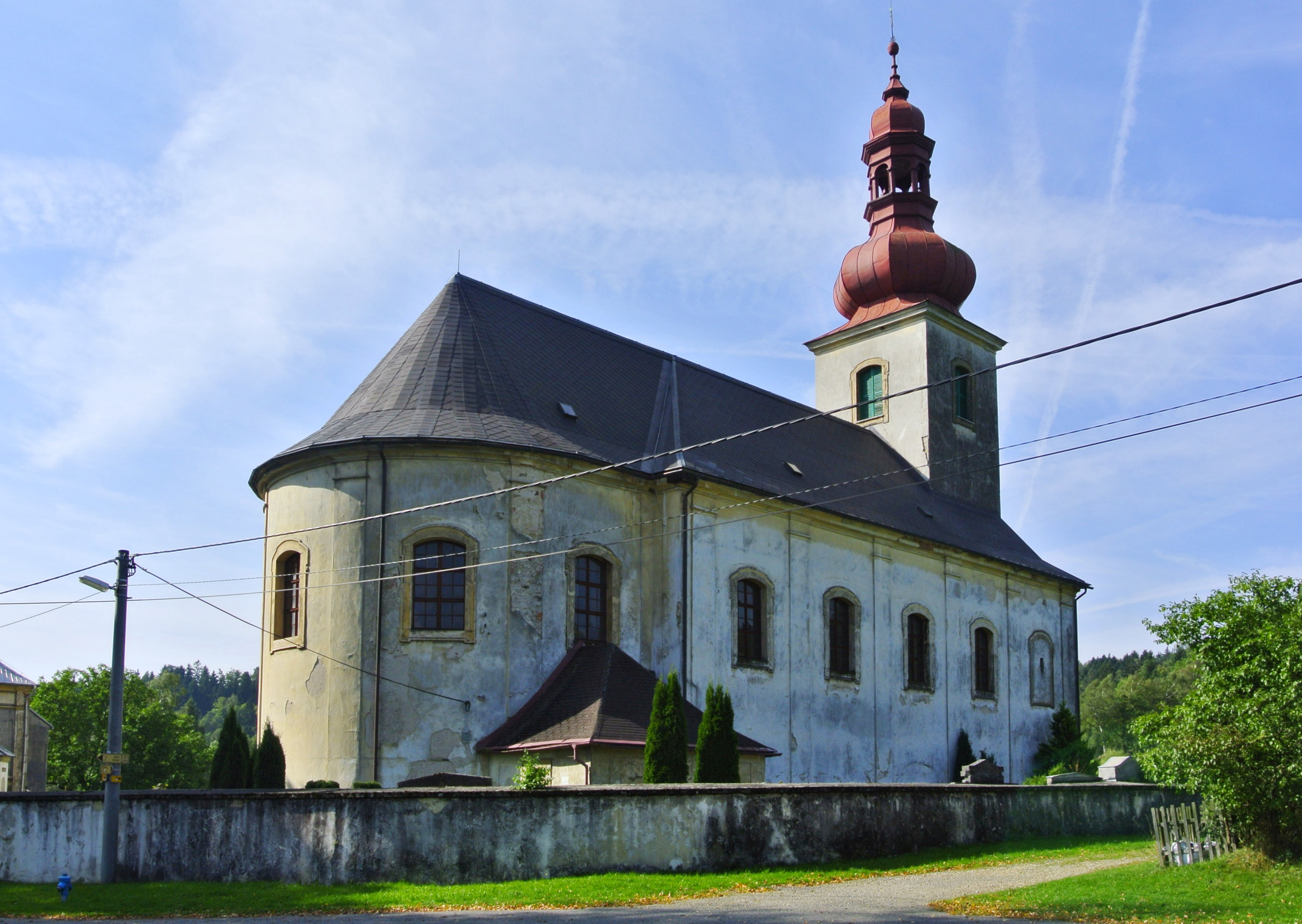 Kostel svatého Jana Křtitele, Zdislava (okres Liberec).